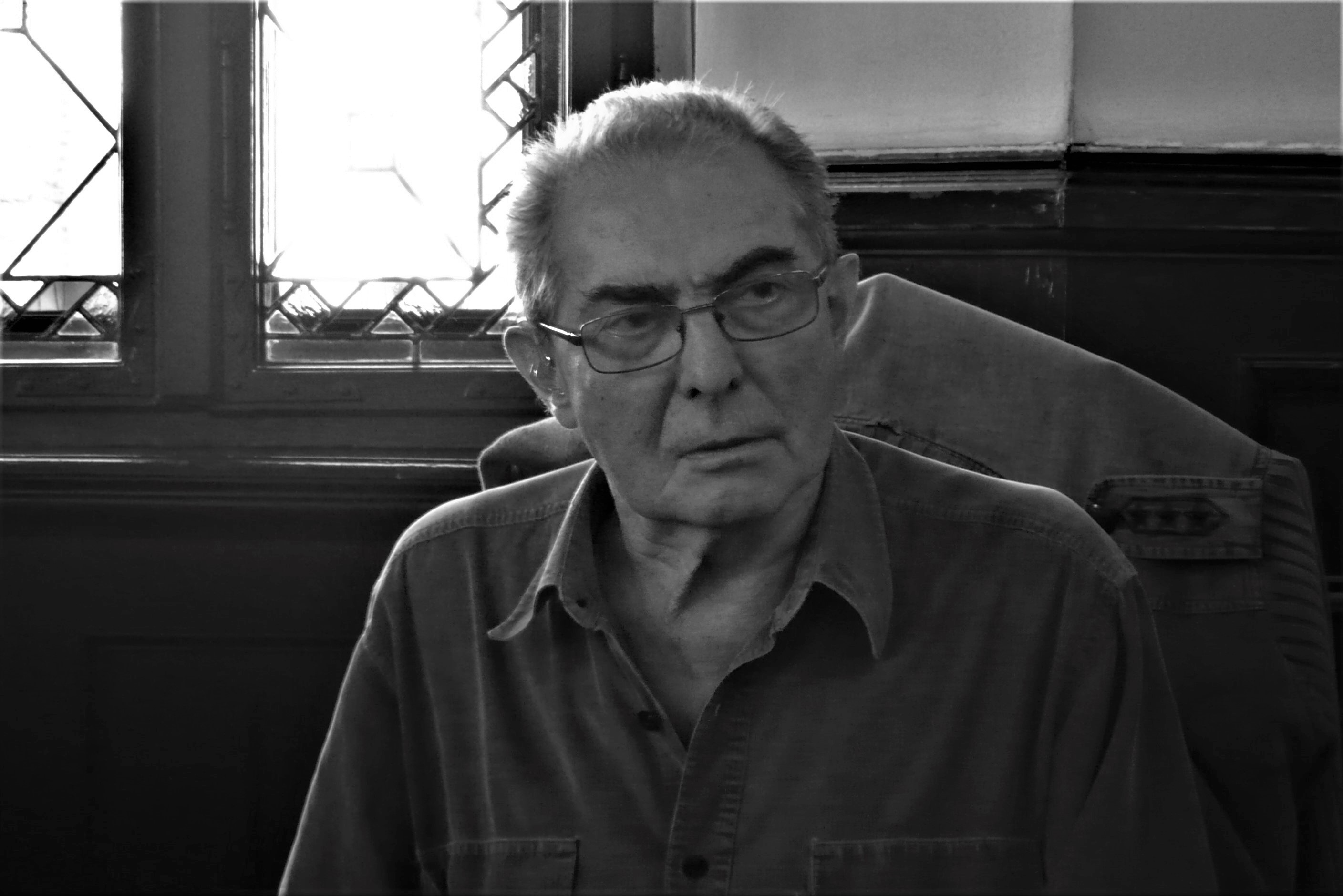 Karol Modzelewski. Festiwal Góry Literatury, 6.07.2017